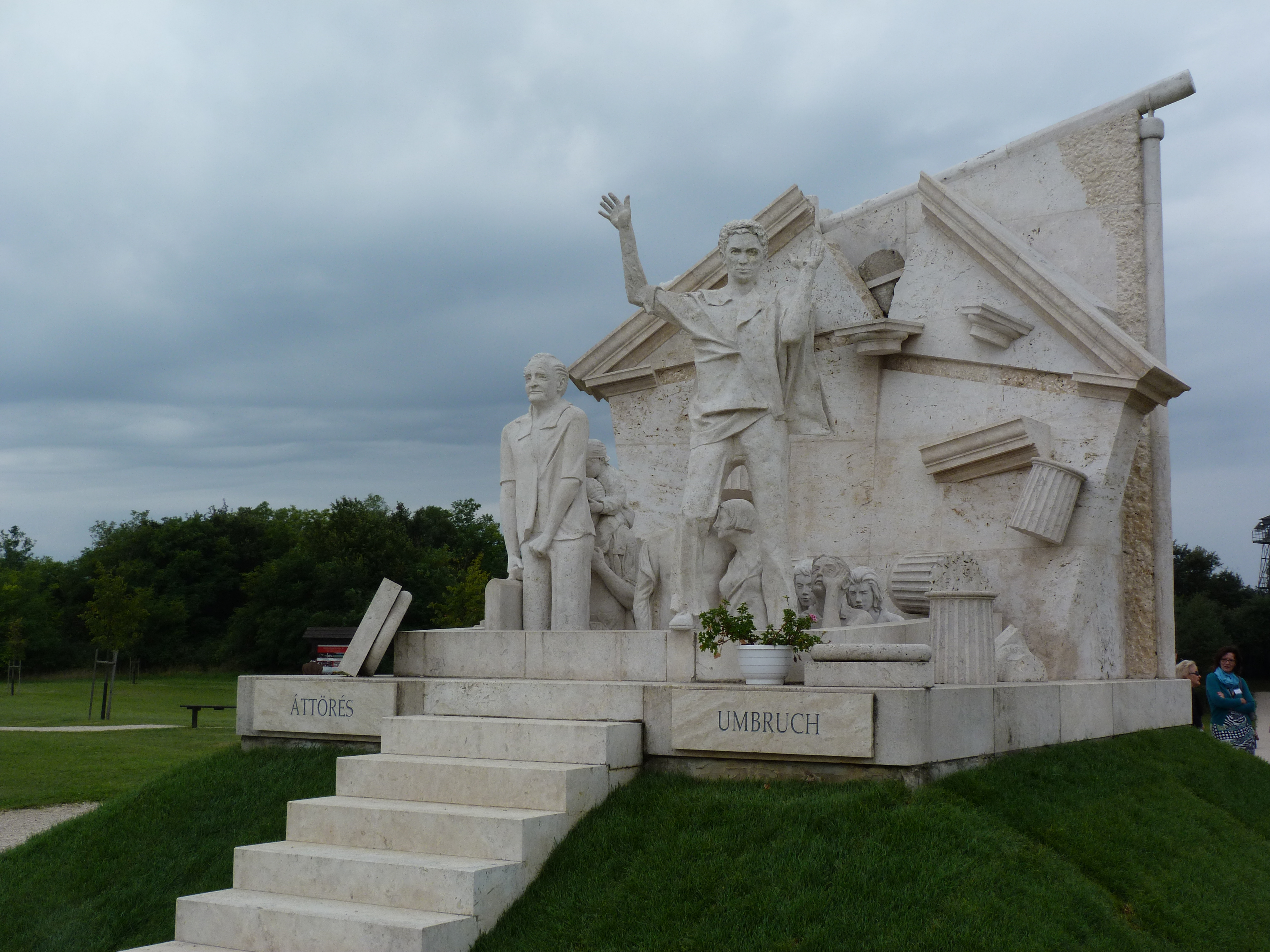 A felvétel 2014. augusztus 19-én, kedden készült Sopronpusztán. 25. Páneurópai Piknik. © Derzsi Elekes Andor, Budapest 2014, You are authorised to use these photos and vids under Creative Commons – even for commercial, for profit purposes. Photos must be attributed to Derzsi Elekes Andor. All of the photos and vids in the Metapolisz DVD line are under Creative Commons and can be used even for commercial – for profit – purposes. Recommended Citation Derzsi Elekes Andor: Metapolisz DVD line